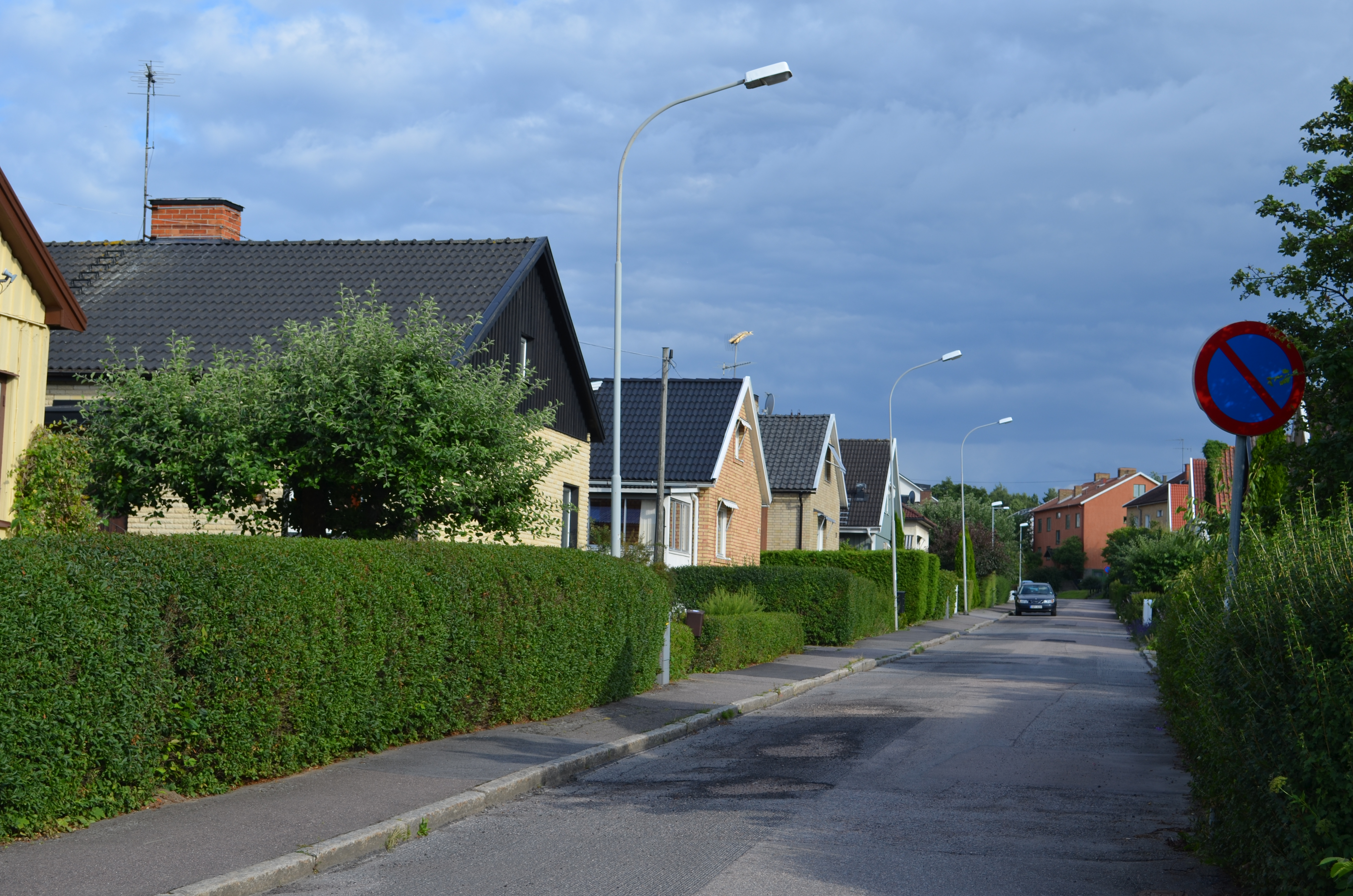 Örngatan i Gottfridsberg, Linköping fotograferad under Kruosio och Mannen av börds sightseeing i Linköping.